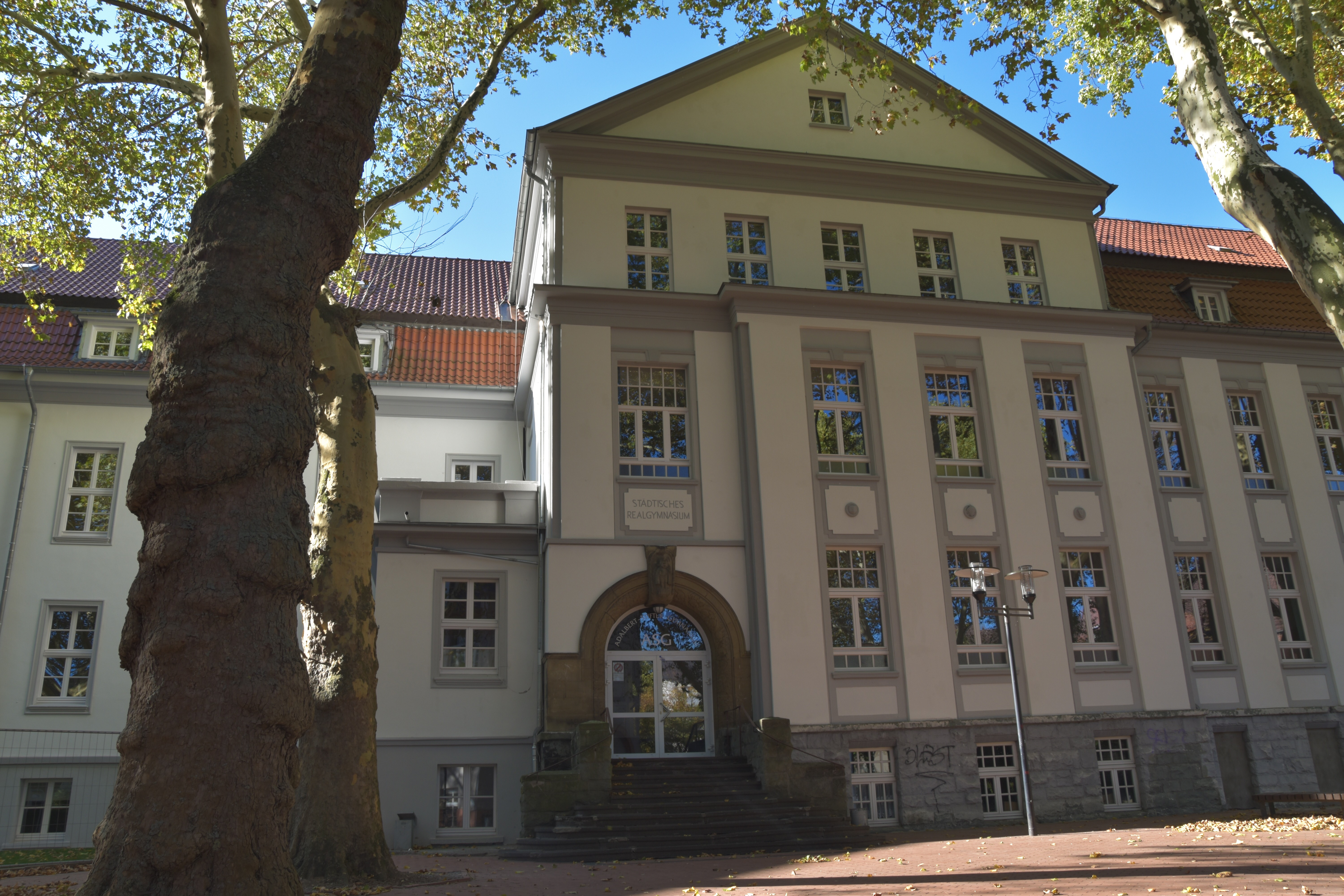 Haupteingang mit der neuen Fassade aus dem Jahr 2018